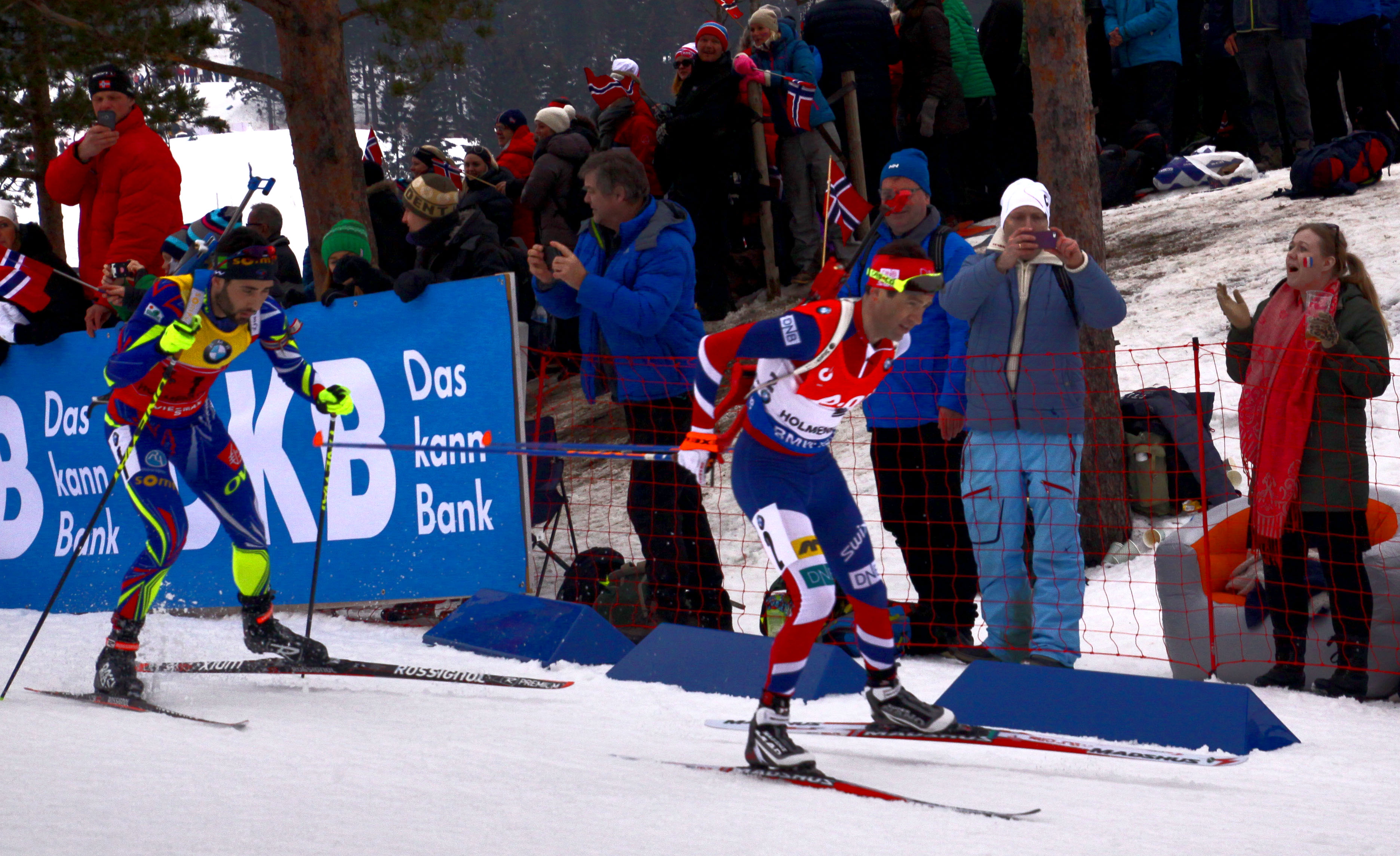 ЧС з біатлону в Осло (2016). На фото - М. Фуркад та У.- А. бьйорндален